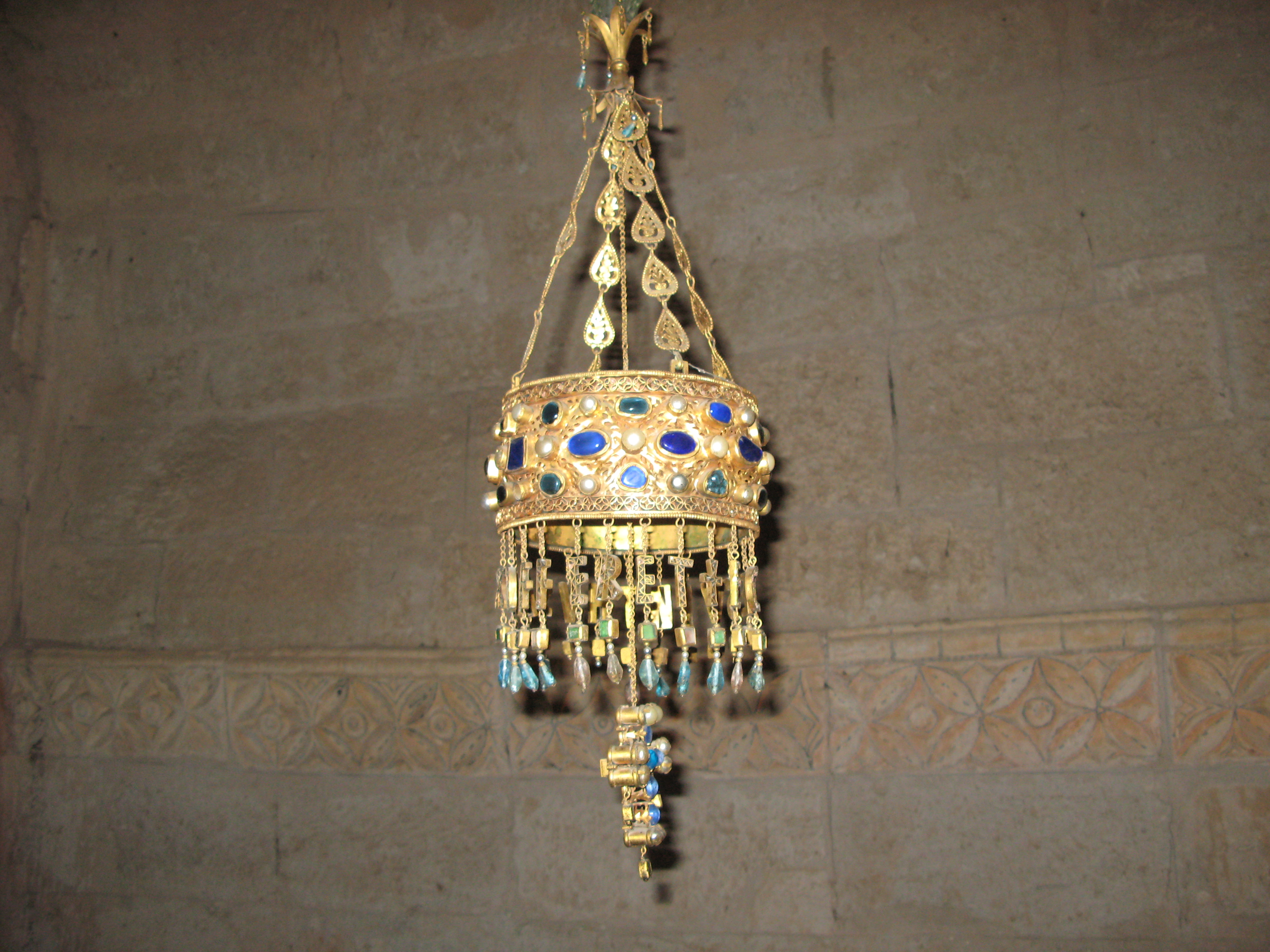 RÉPLICA DE LA CORONA EN SAN JUAN DE BAÑOS,EN LA LOCALIDAD DE BAÑOS DE CERRATO, MUNICIPIO DE VENTA DE BAÑOS, PROVINCIA DE PALENCIA, COMUNIDAD DE CASTILLA Y LEÓN, ESPAÑA.